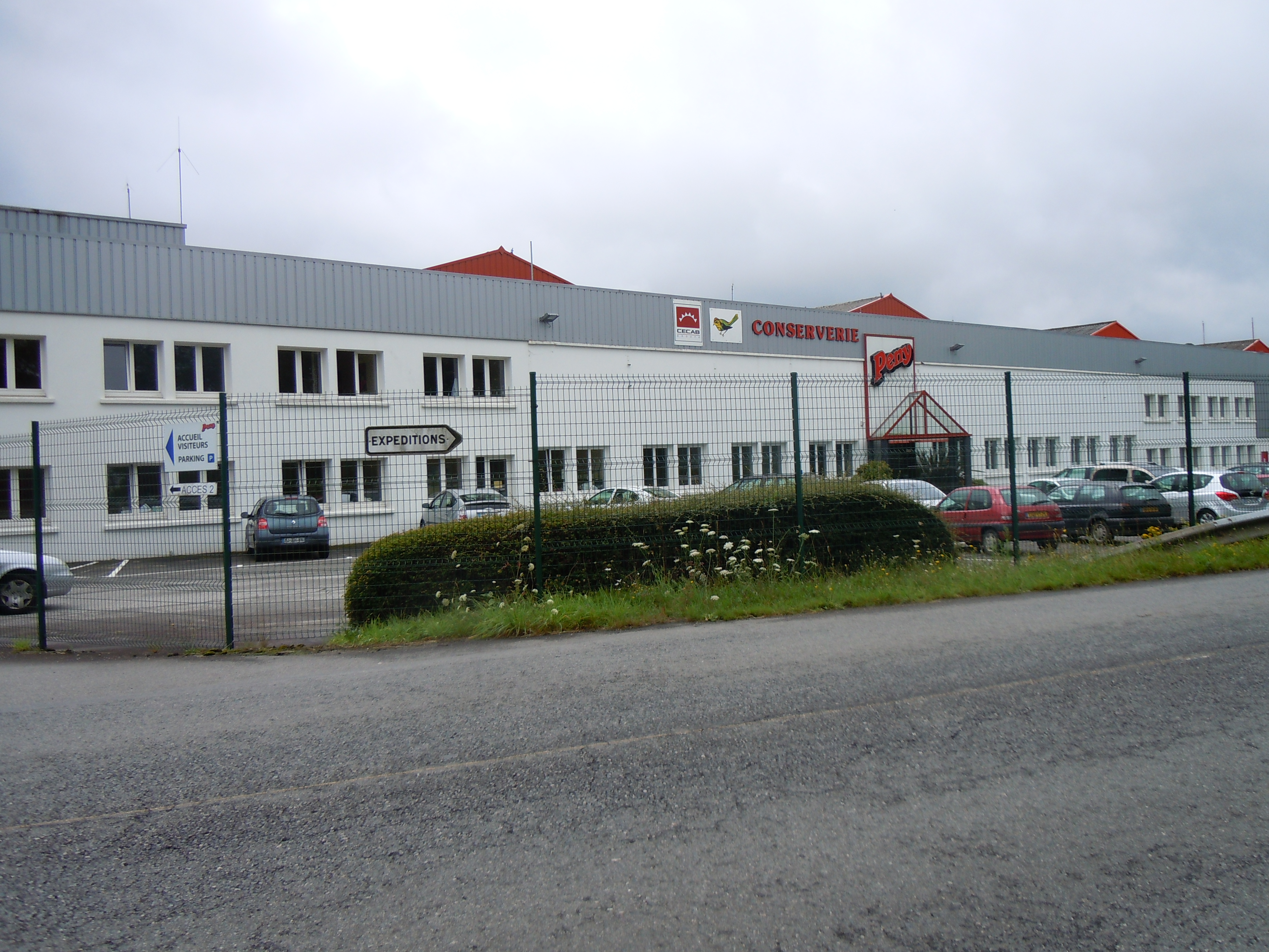 la conserverie Peny en Saint-Thurien, département du Finistère